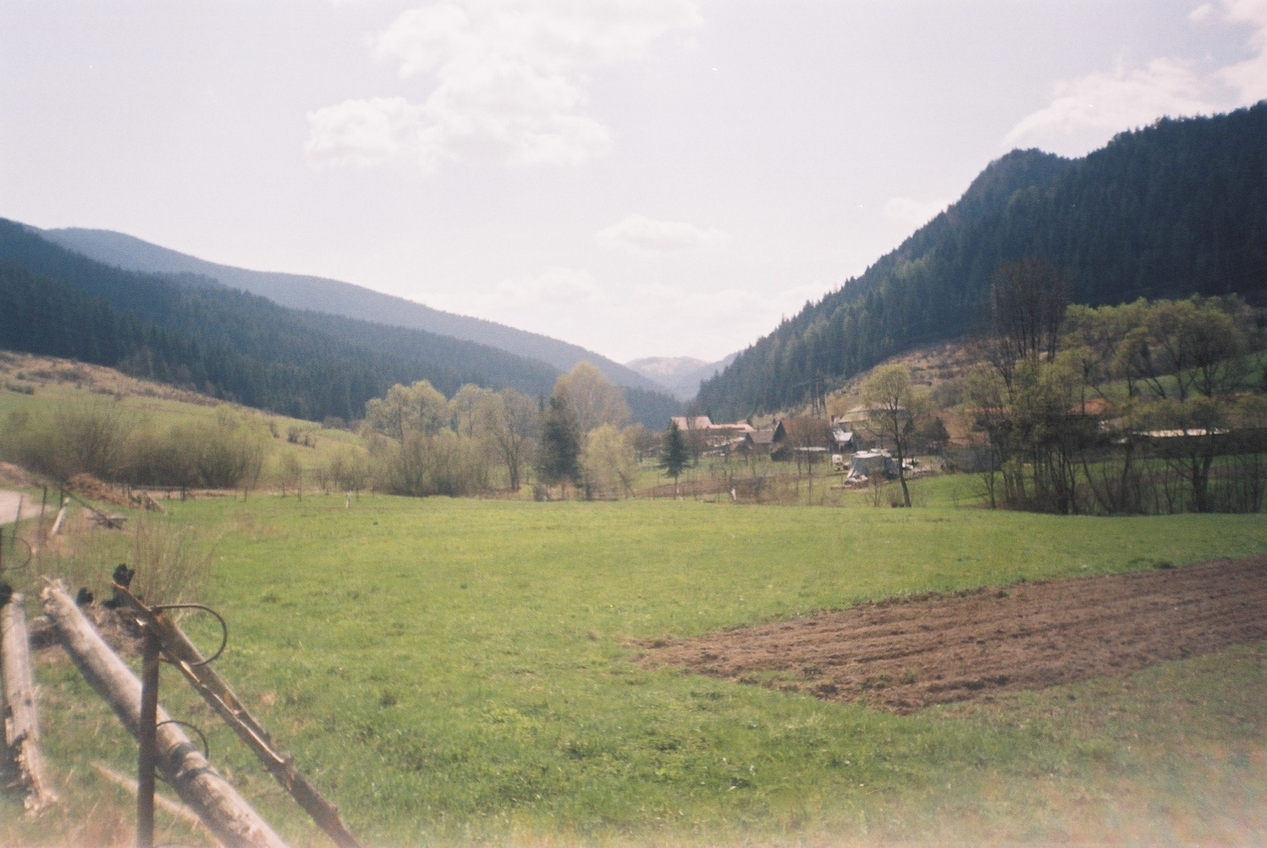 Ludrova village in Slovakia